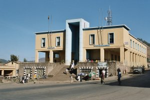 zelf gemaakt